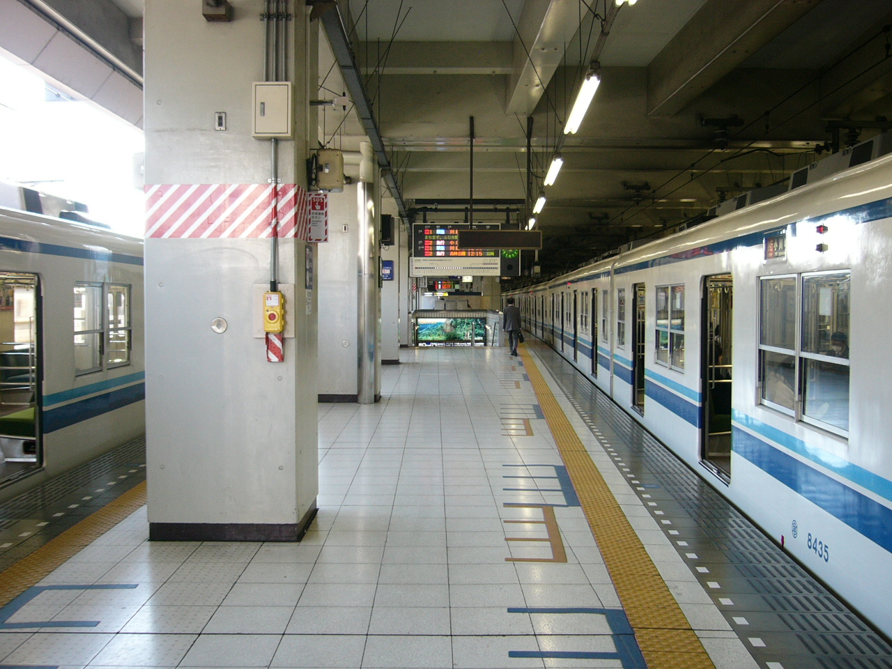 Ikebukuro Station (Tobu Platform)